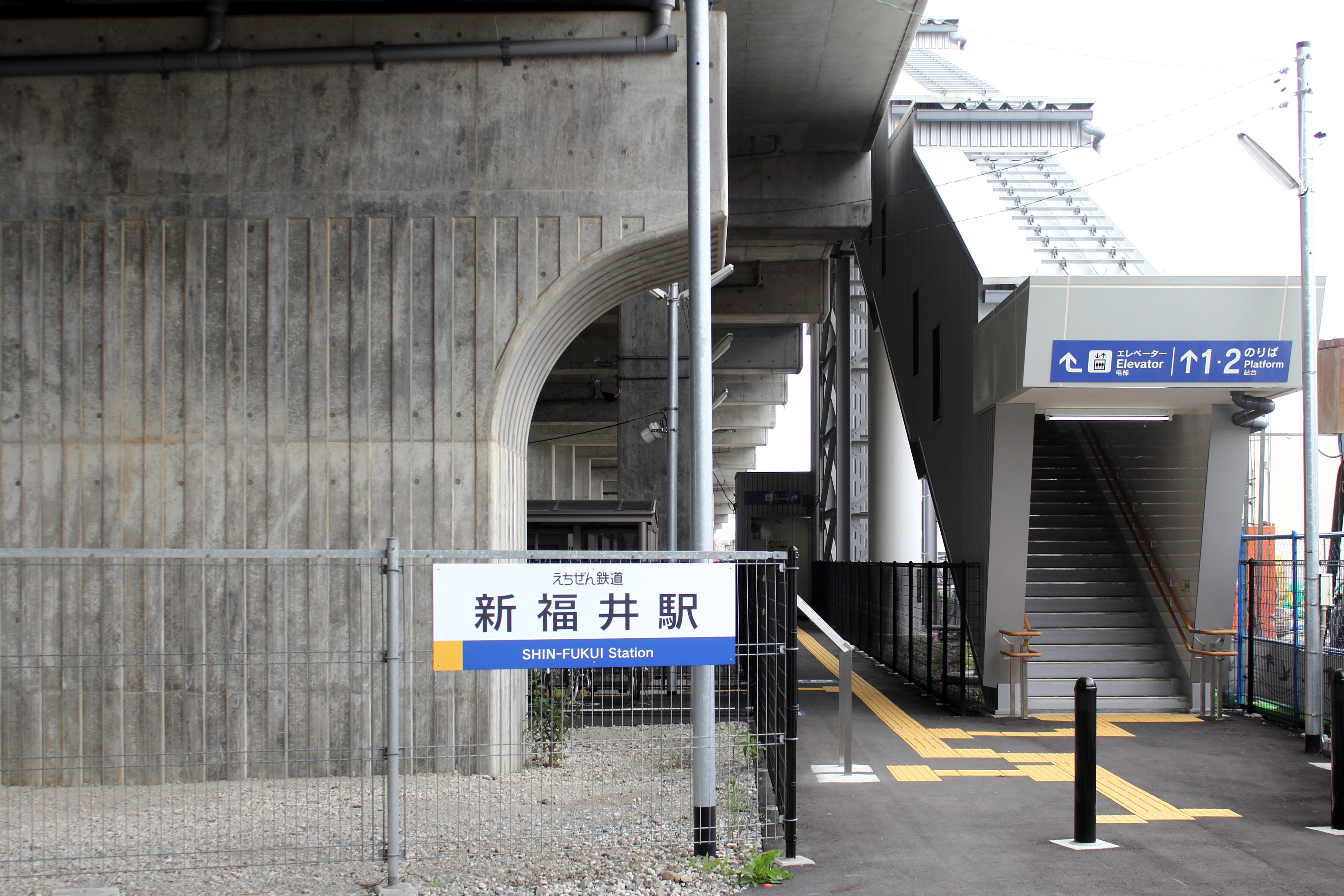 えちぜん鉄道 新福井駅